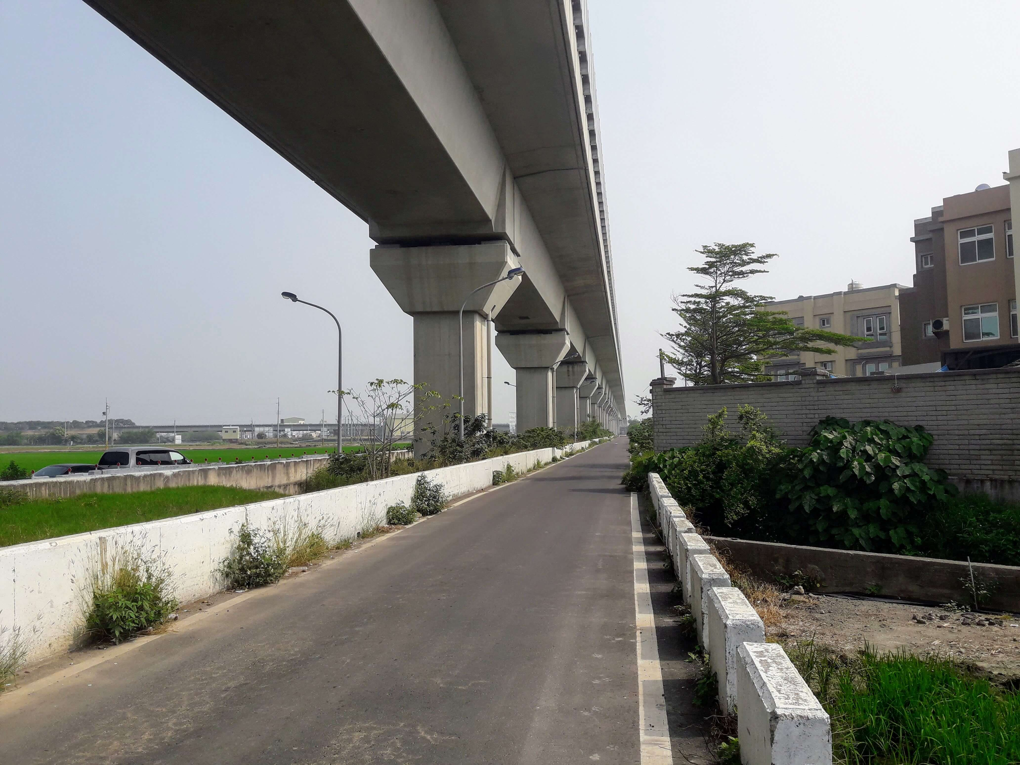 高鐵高架橋下的道路，攝於雲林縣土庫鎮。